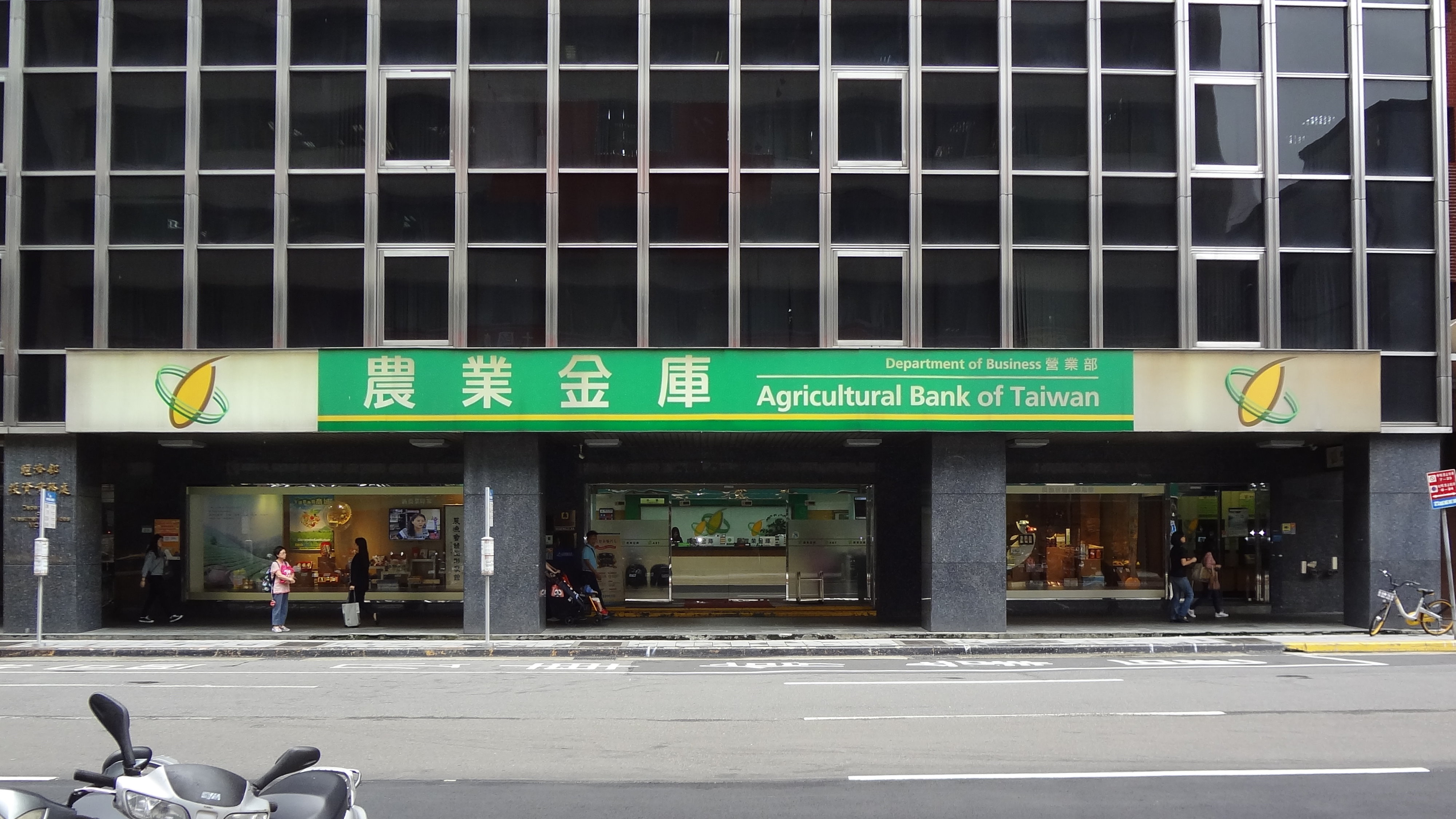 全國農業金庫營業部，地址：臺北市中正區館前路71號1樓（館前聯合大樓）。